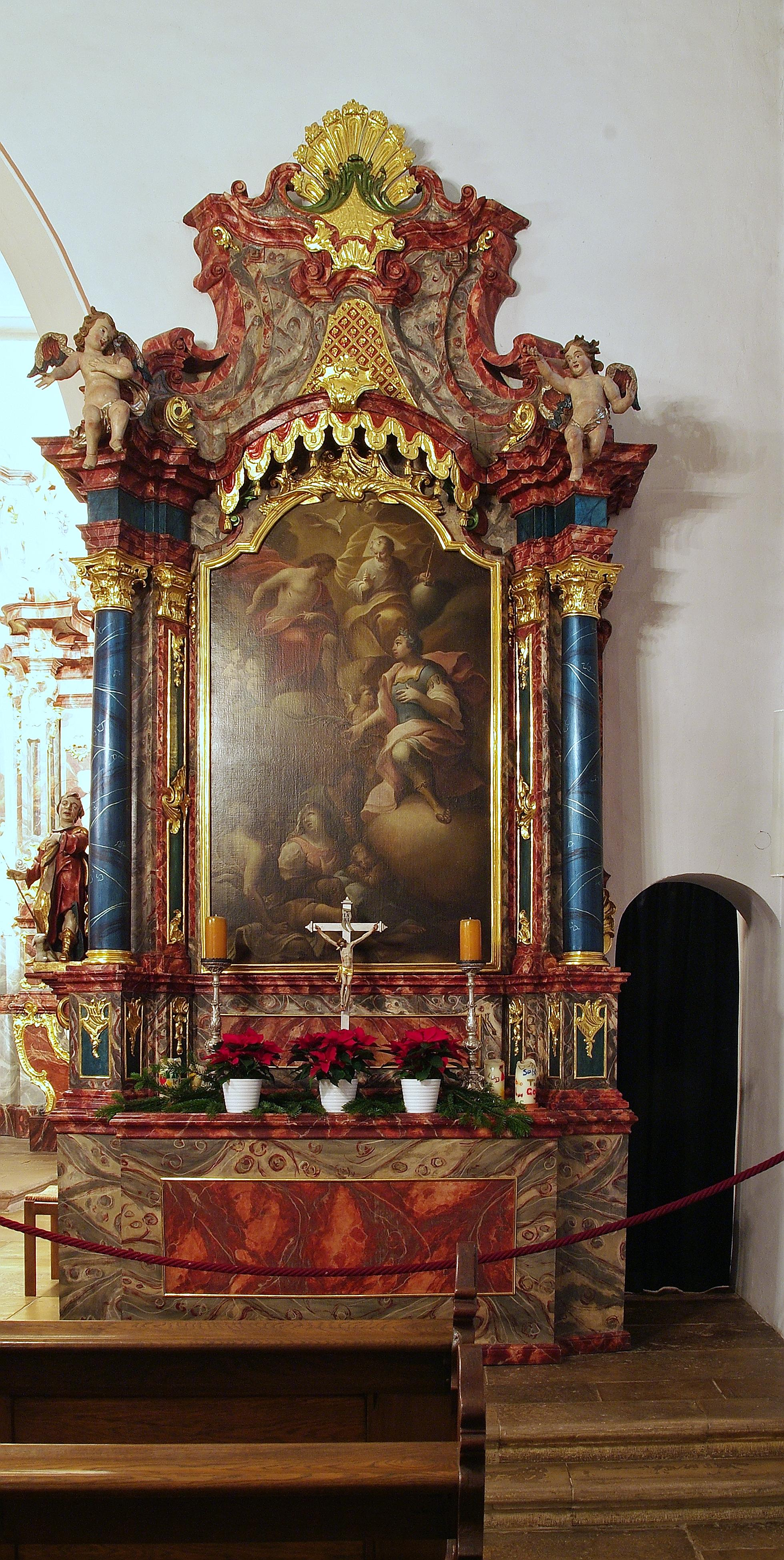 St. Sebastianus-Altar, St. Martin (Freiburg)